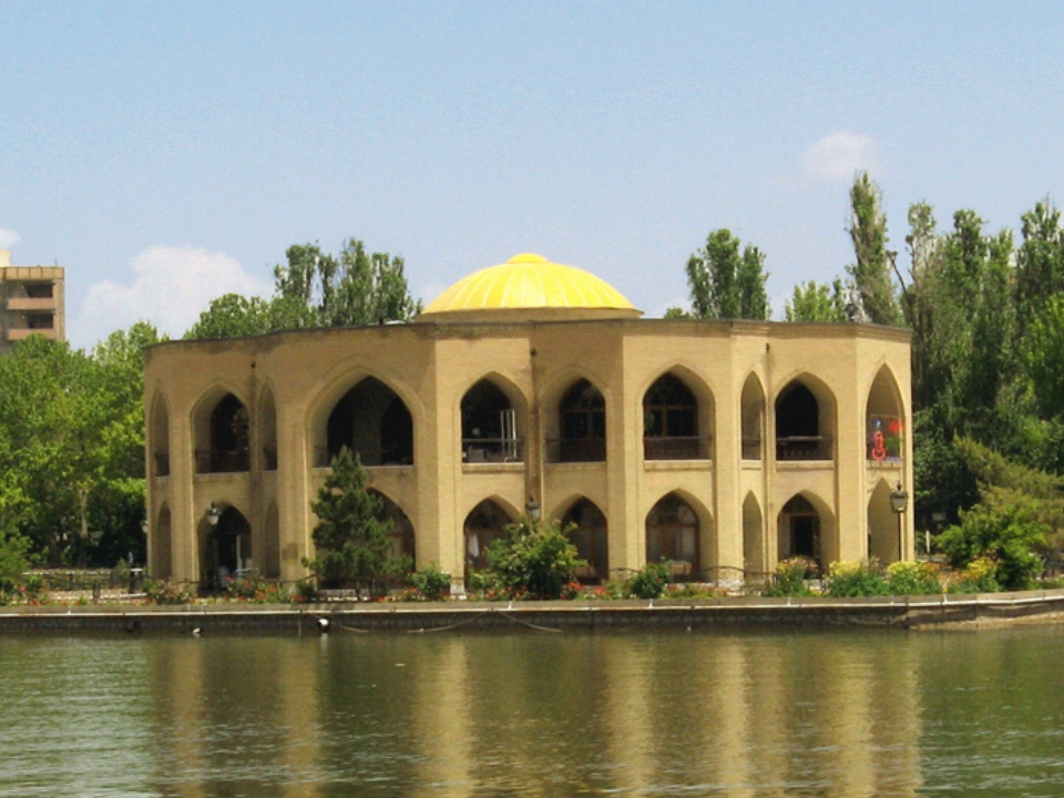 el goli